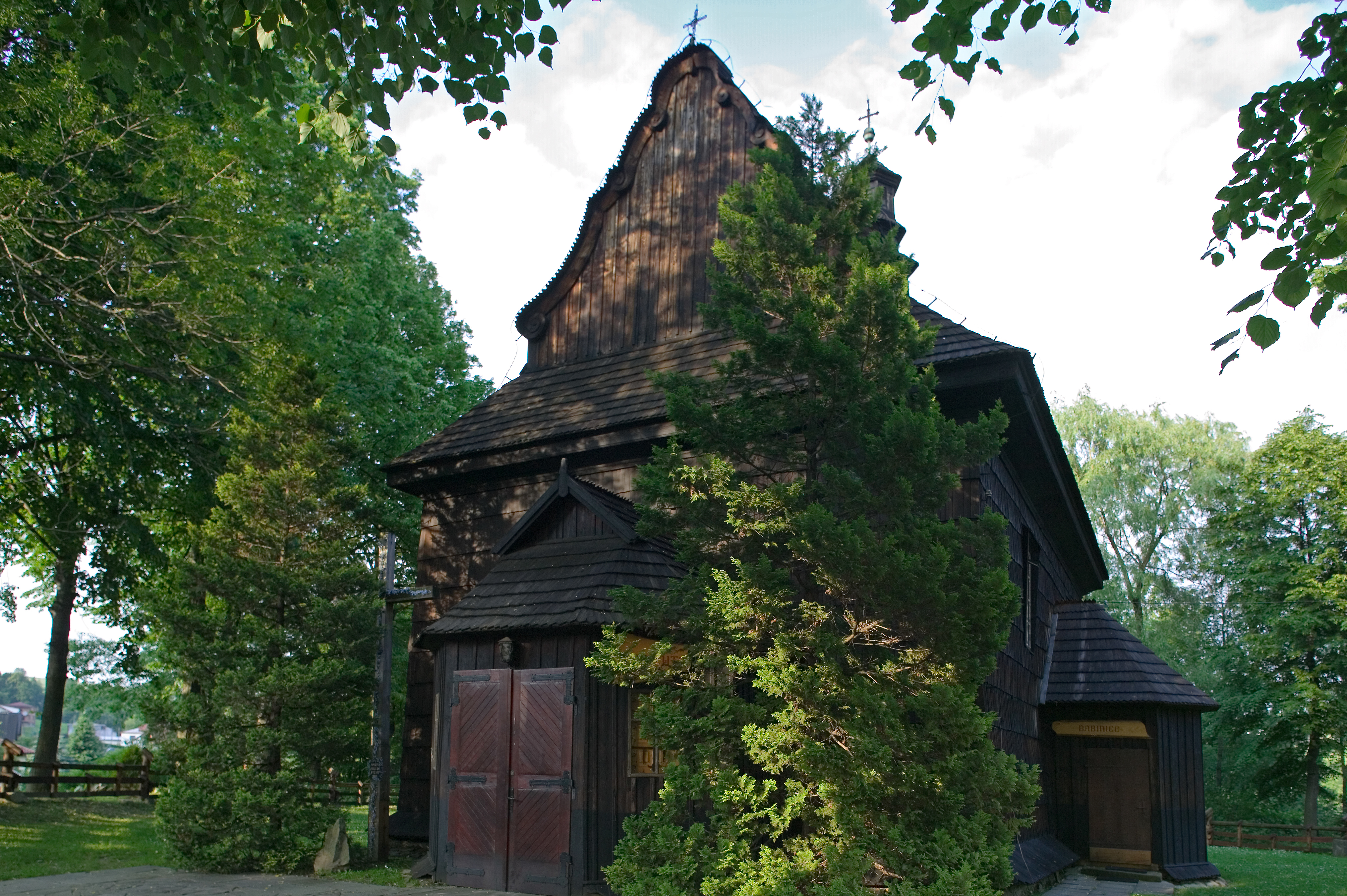 Szymbark - rzymskokatolicki kościół parafialny pw. św. Wojciecha, 1782